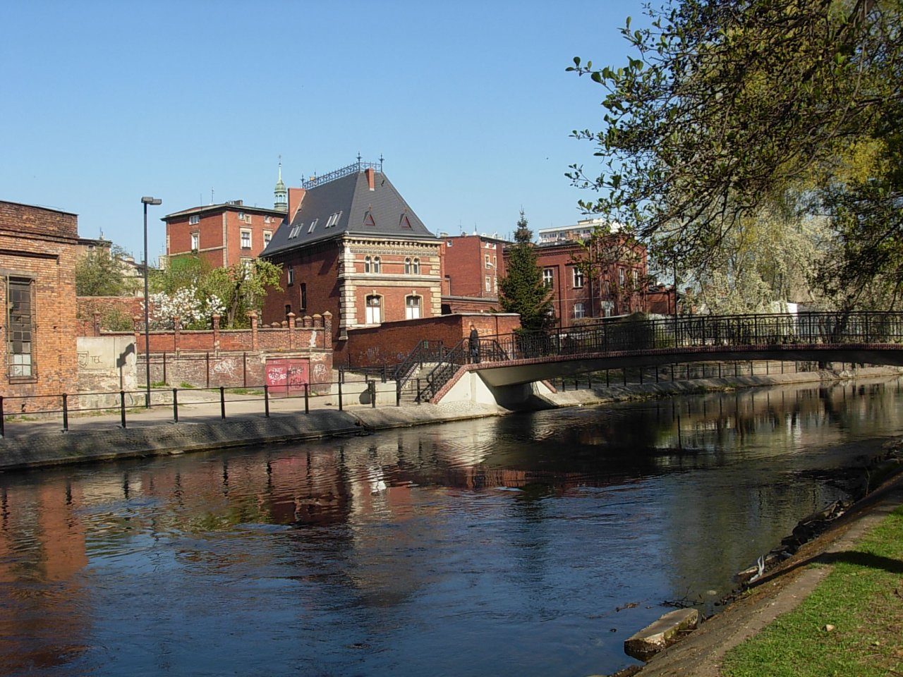 Okolice kładki Św. Trójcy na Wyspie Młyńskiej w Bydgoszczy